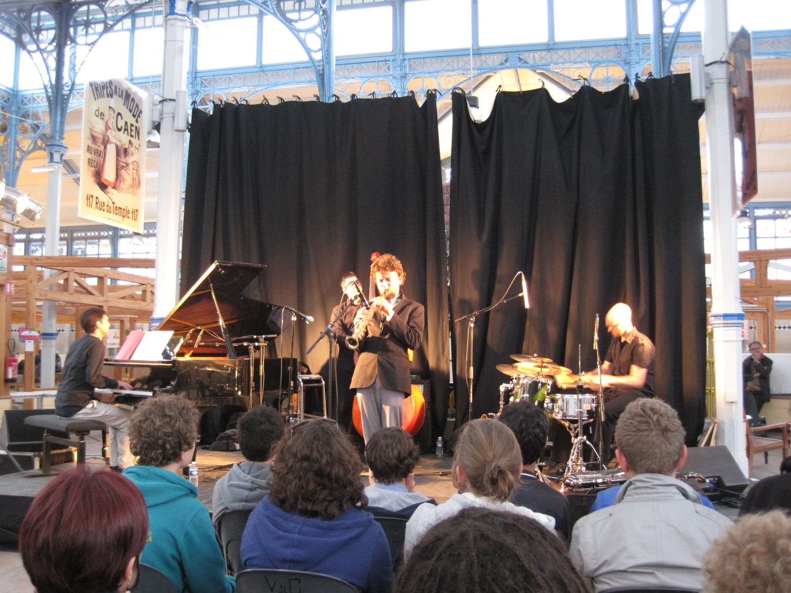 Le groupe de jazz wwquartet à Chaumont (52) en juillet 2011